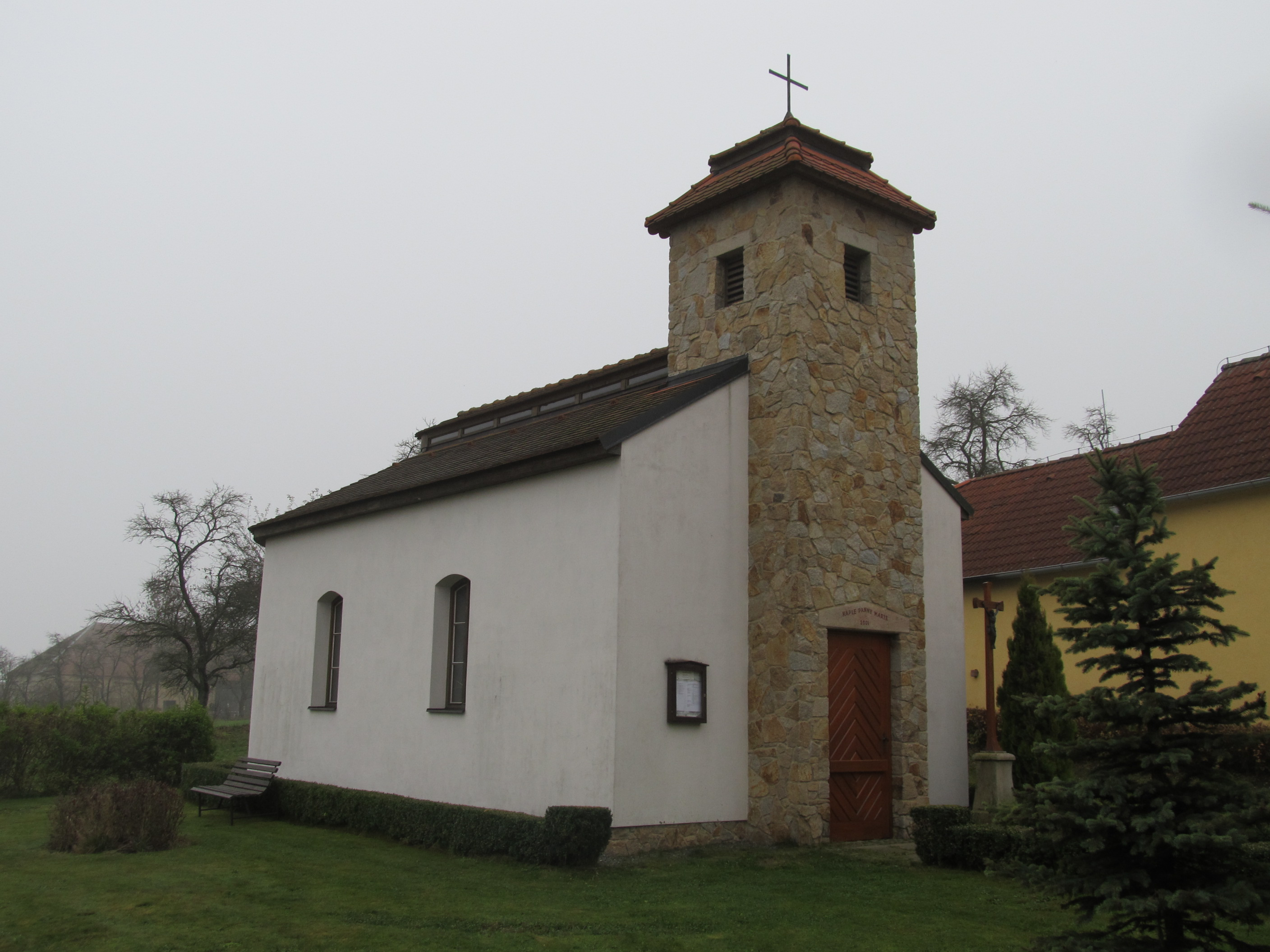 Borovná - kaple Panny Marie